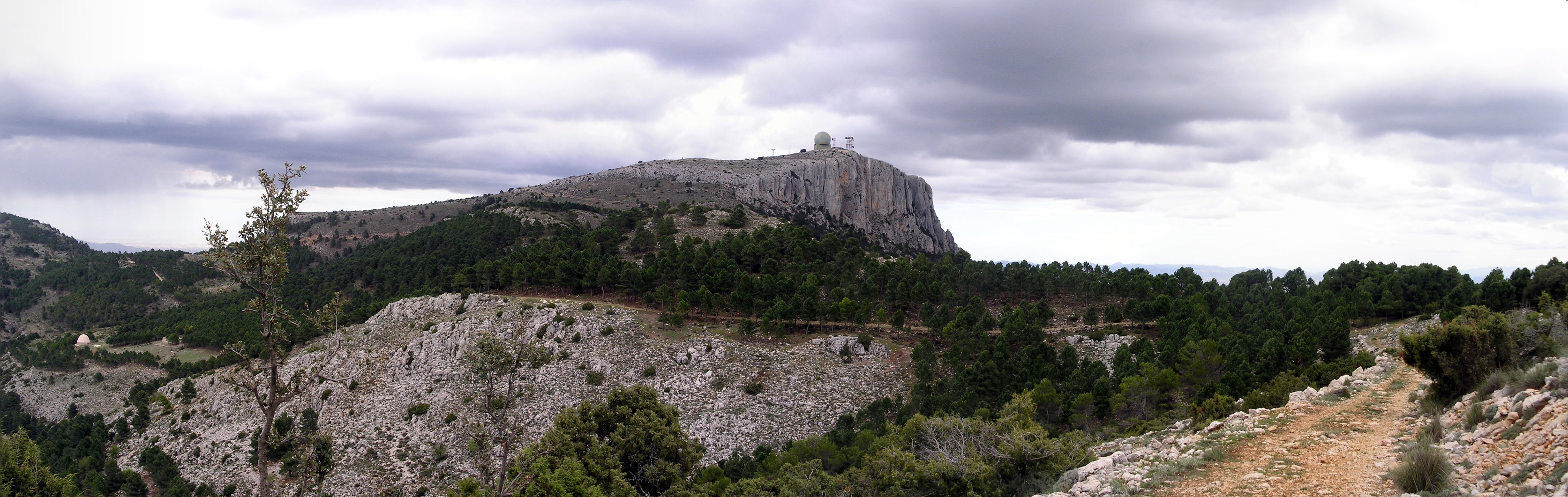 2011-04-22 Morrón de Espuña (Panorama)